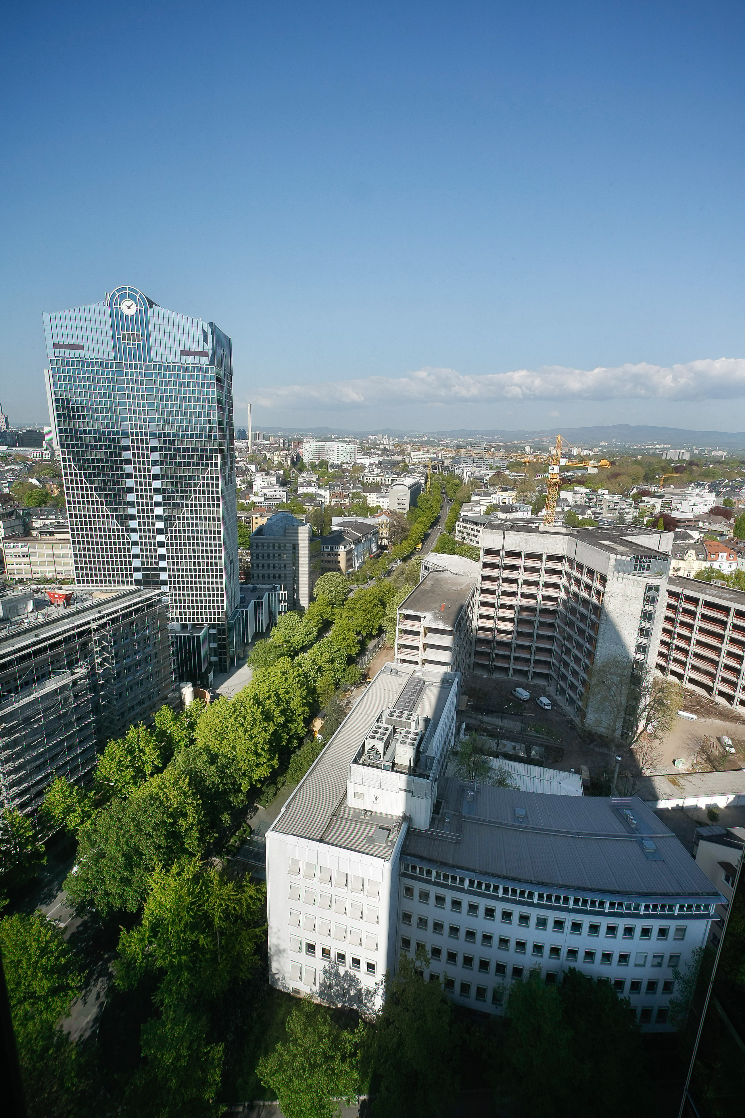 Bockenheimer Landstraße gesehen vom 16. Stock des Westend-Duos in Richtung Nordwesten